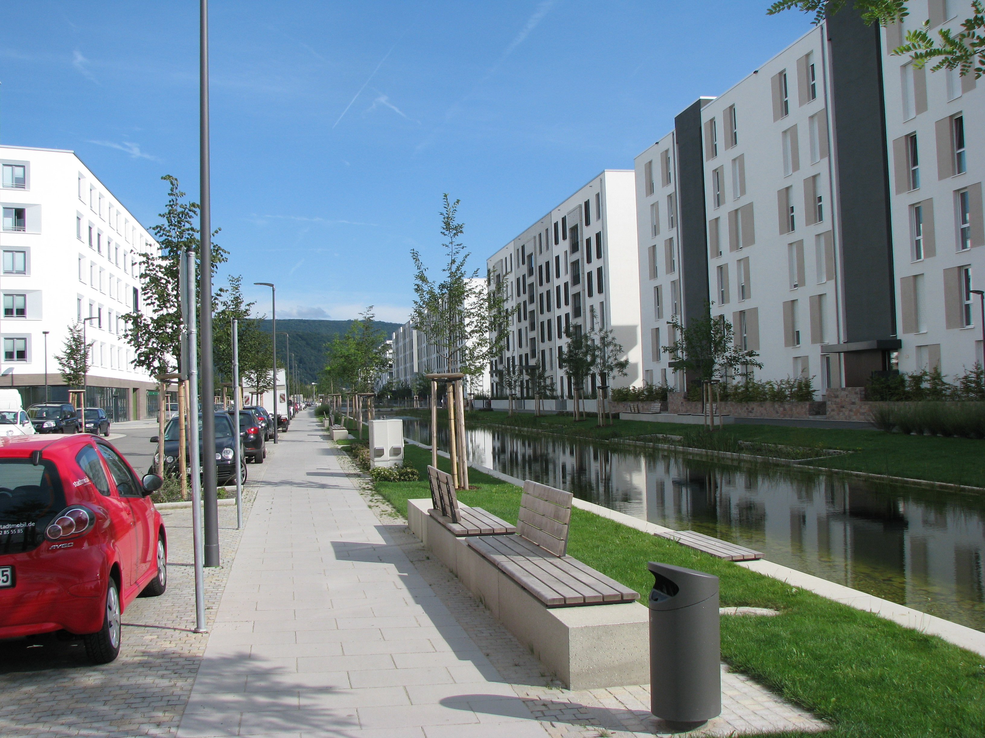 Der Lange Anger in der Heidelberger Bahnstadt